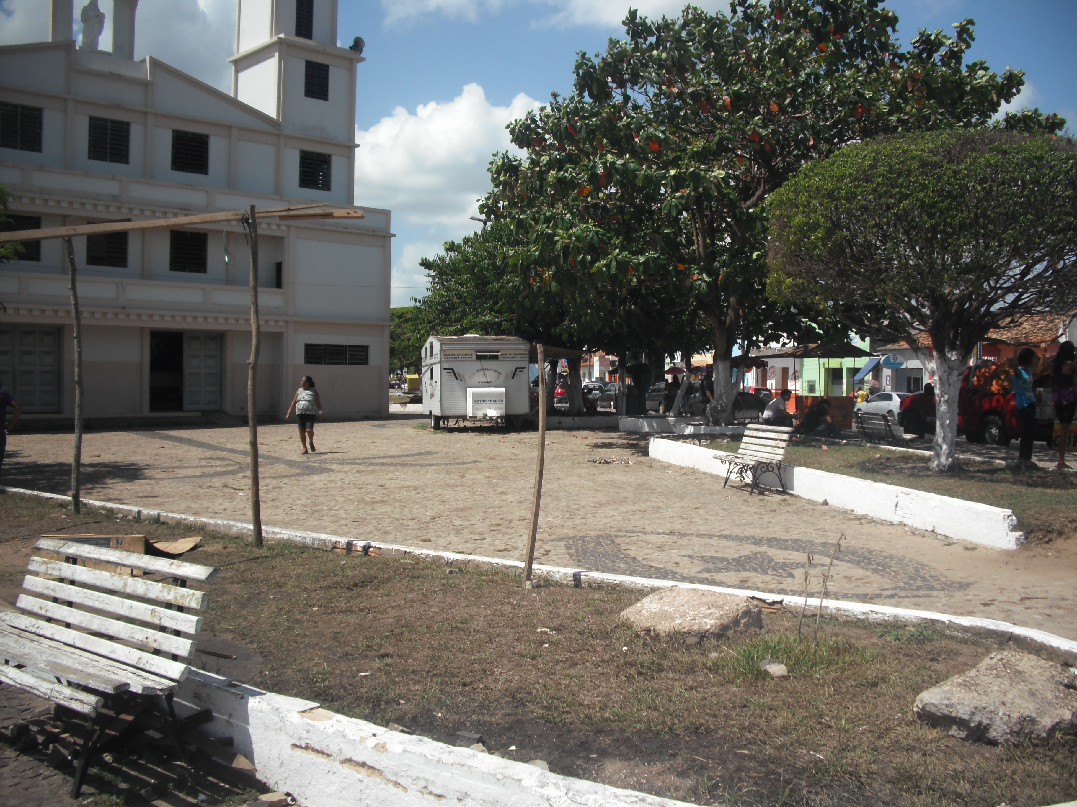 praça da matriz sta ines